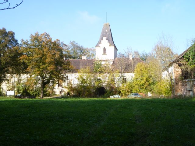 Schloss Inharting_Turm mit Schlosskomplex1